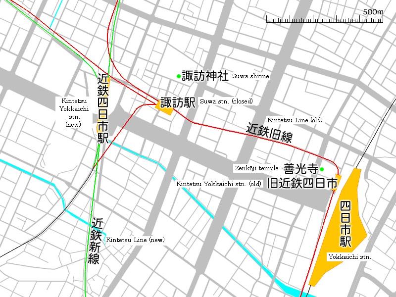 諏訪駅・四日市駅の変遷地図。